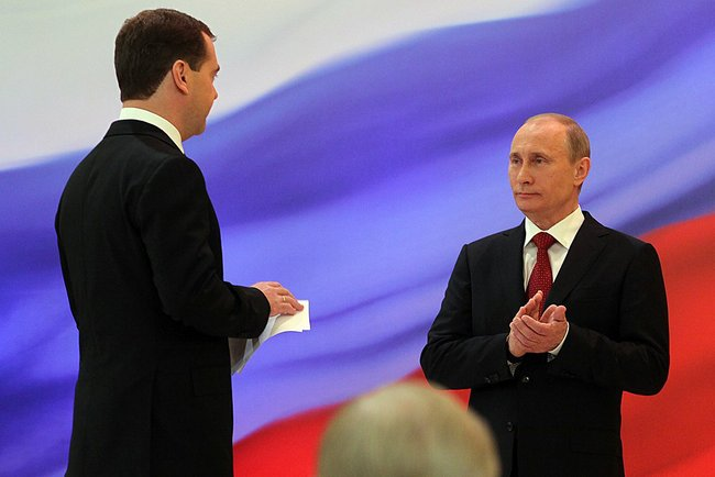 La ceremonia de inauguración de Vladímir Putin como Presidente de Rusia.